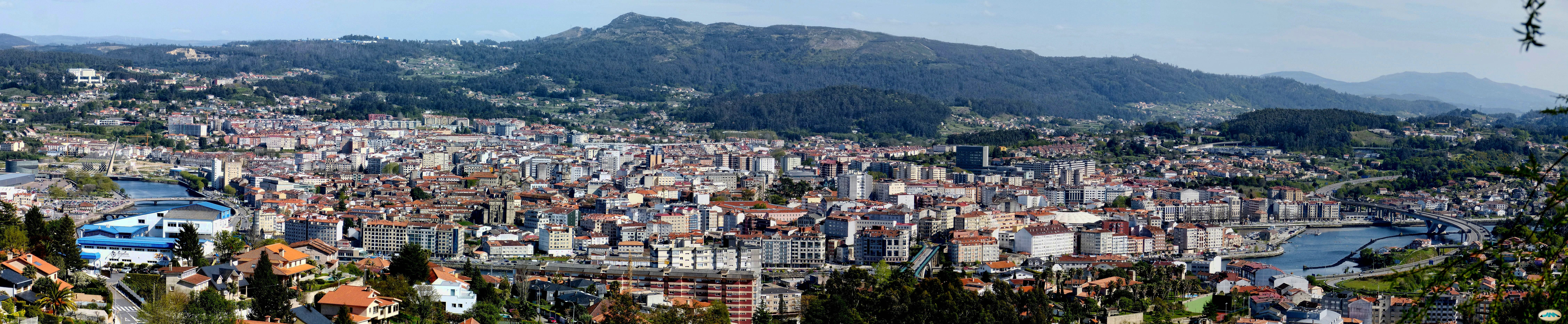 Pontevedra-Vista parcial